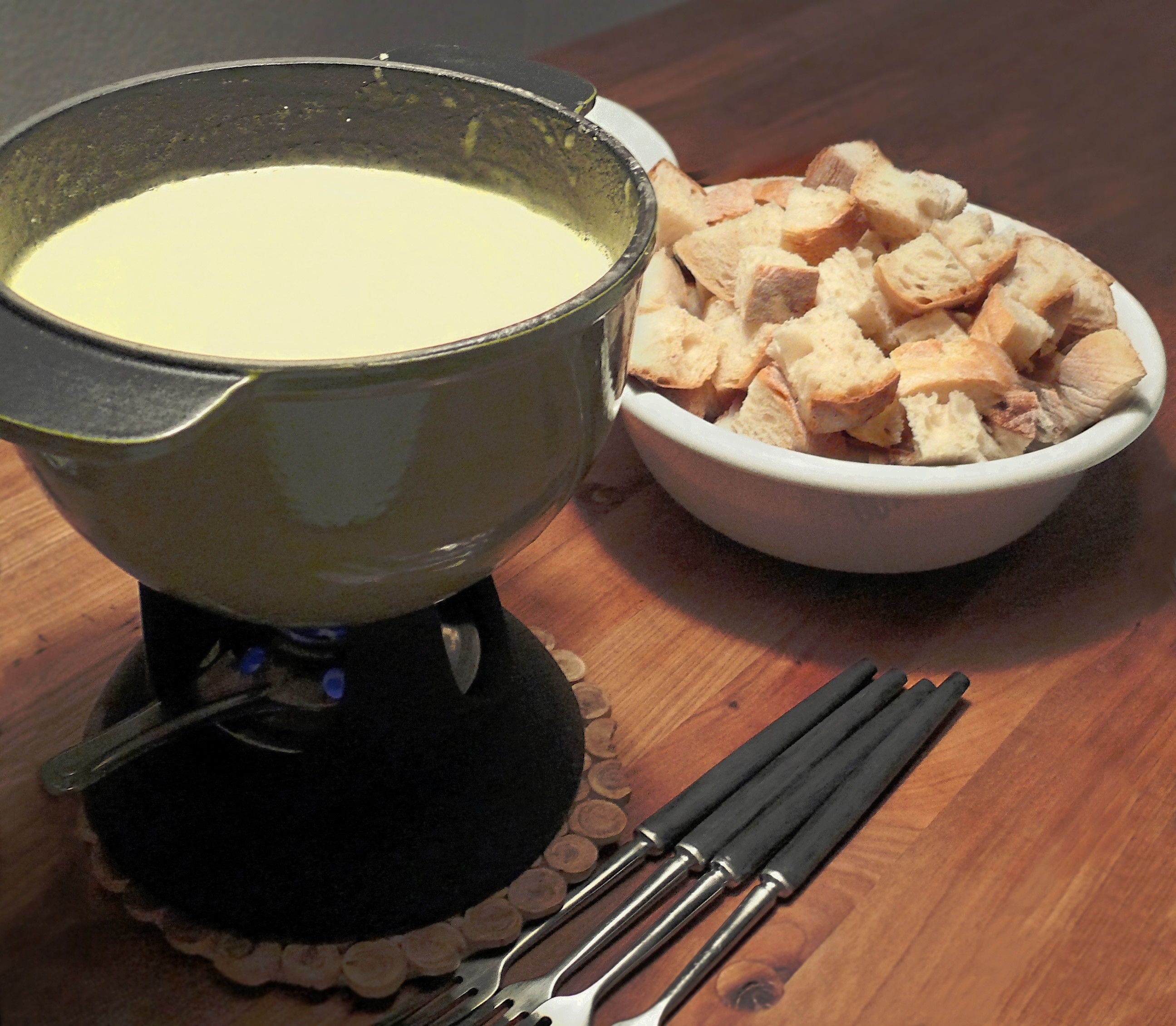 Schweizer Käsefondue mit Brotstückchen. Hier Zubereitung des Käsefondues in einer Fonduepfanne aus Keramik (Caquelon) auf einem Rechaud, sowie mit speziellen Fonduegabeln.